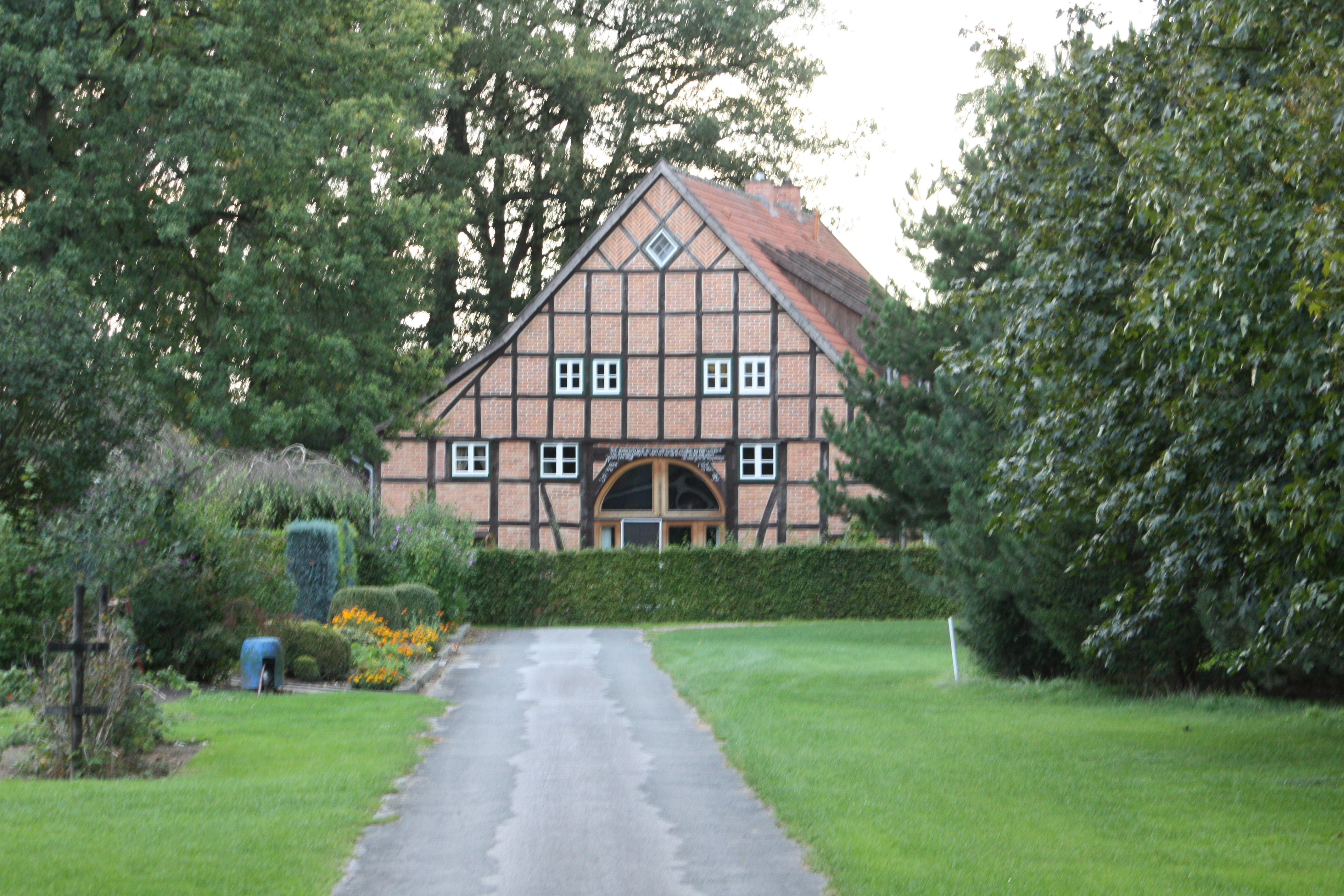 Vierständer-Längsdeelenhaus in Marienfeld, Nr. 53 der Denkmalliste von Harsewinkel